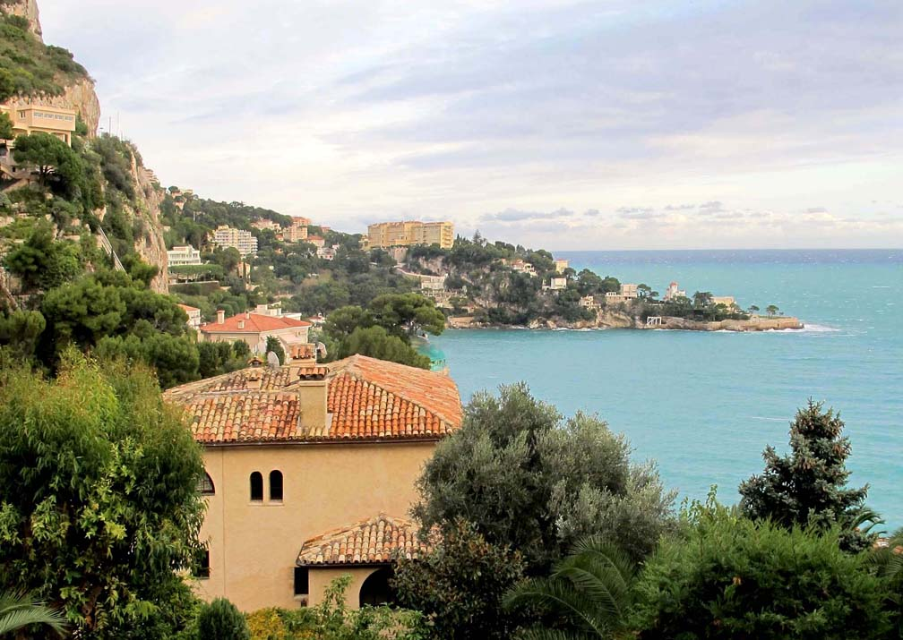 Cap-d'Ail, la Baie de Saint-Laurent et le cap Mala, PACA, France